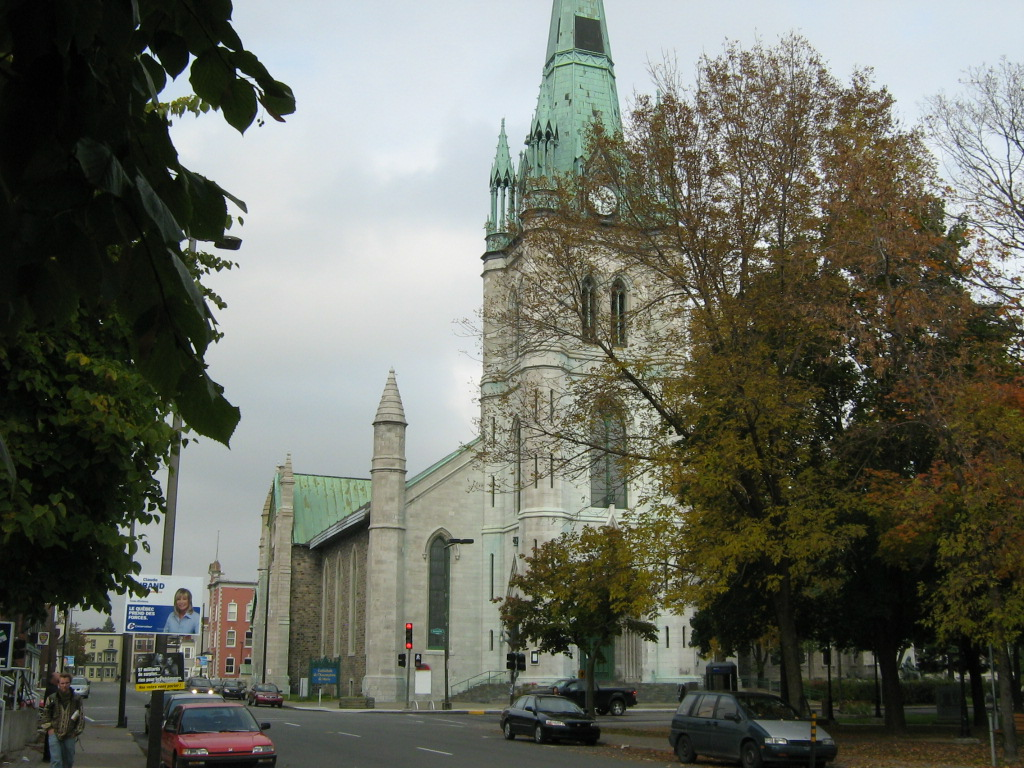 Cathédrale de l'Assomption de Marie à Trois-Rivières (Québec), Canada